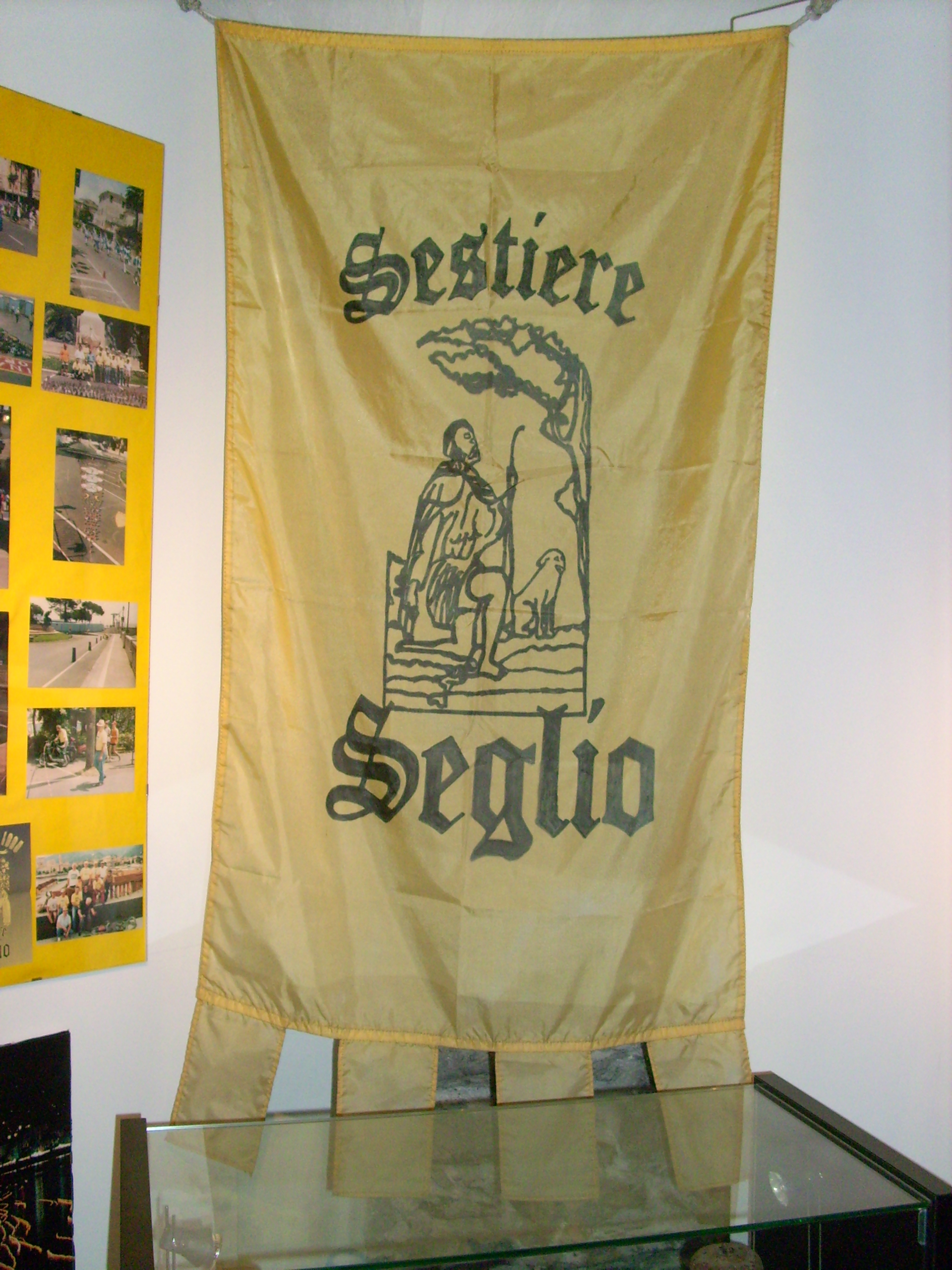 Bandiera del Sestiere Seglio di Rapallo, Liguria, Italia